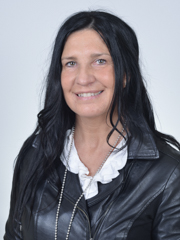 Lara Magoni, politica italiana